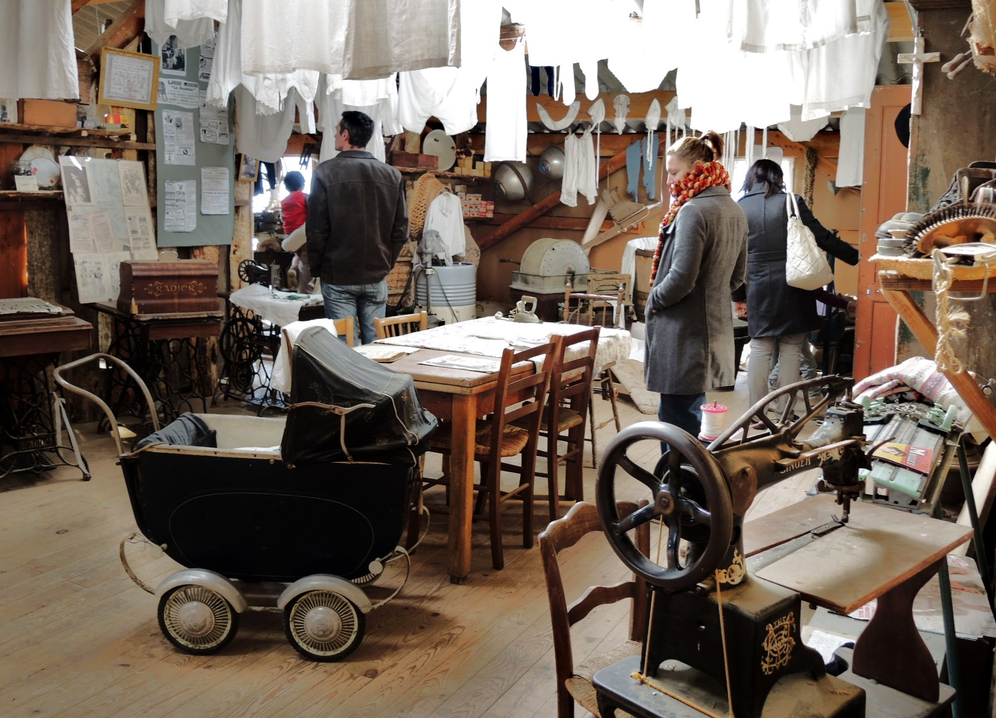 Peaugres détail